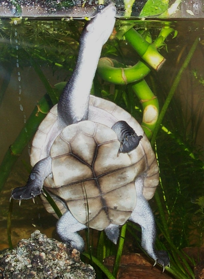 Schlangenhalsschildköte, Chelodina mccordi, Jungtier